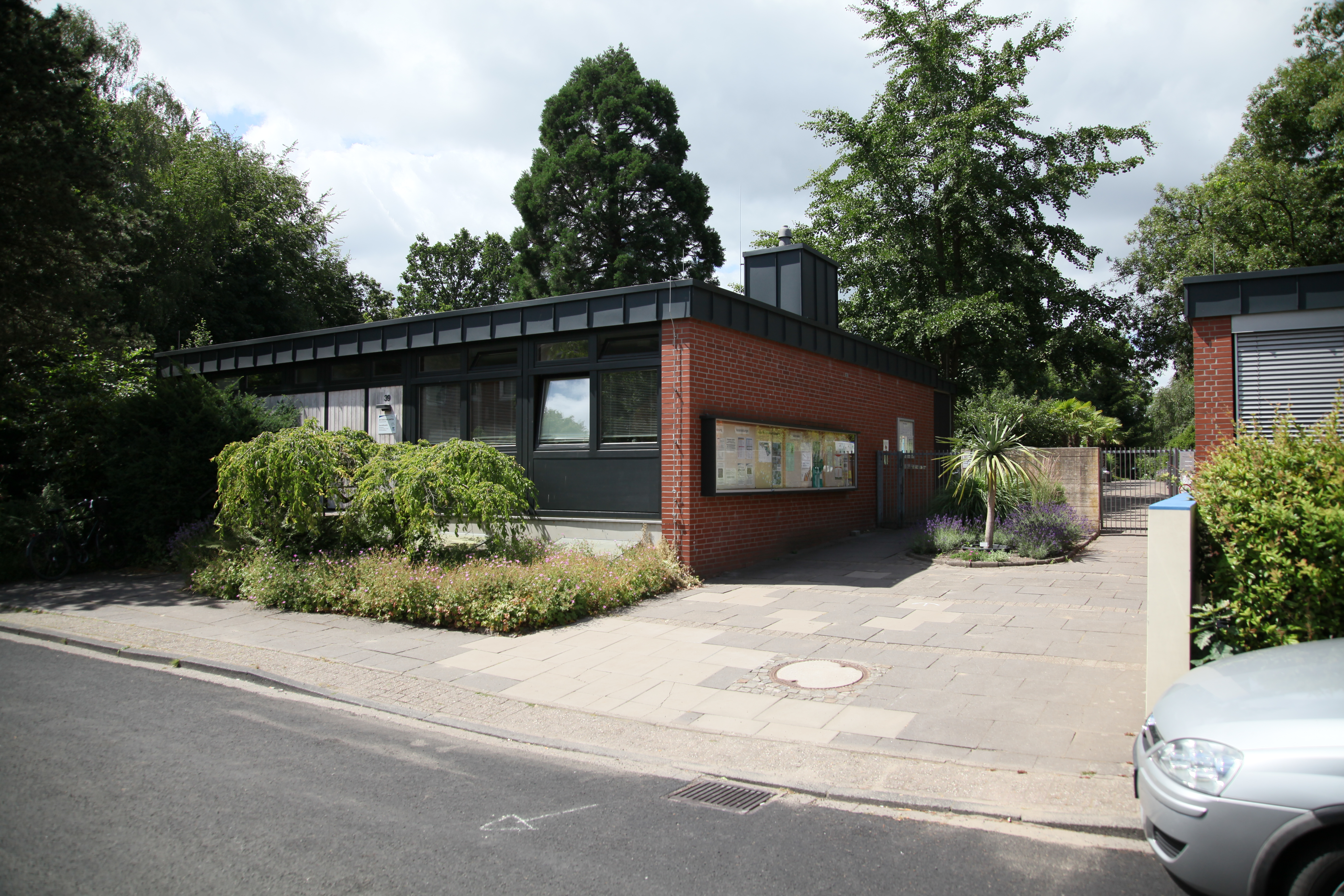 Eingangsbereich des Botanischen Gartens Oldenburg.